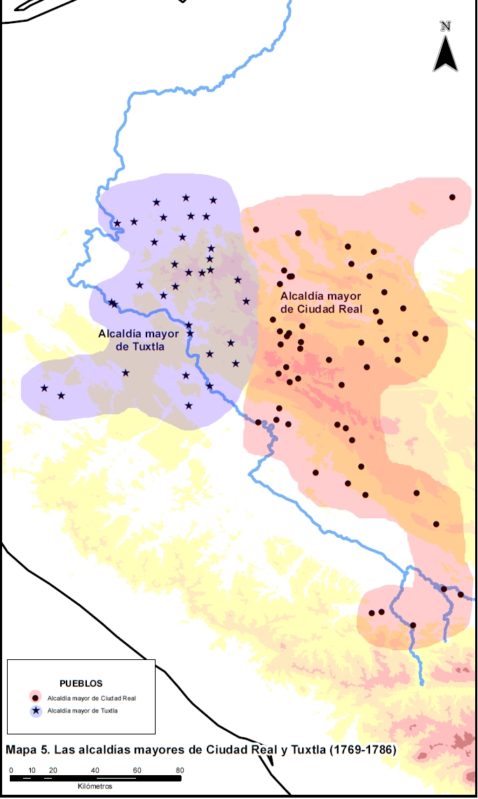 Representación de los pueblos que pertenecieron a las dos alcaldías mayores de la provincia de Chiapas en el siglo XVIII